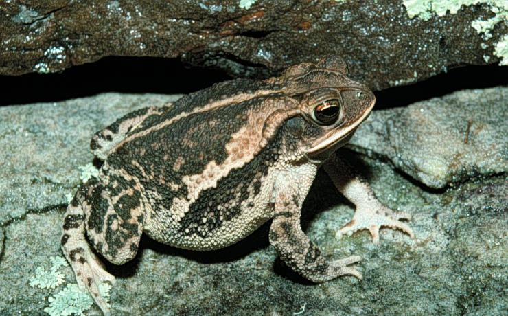 Bufo nebulifer